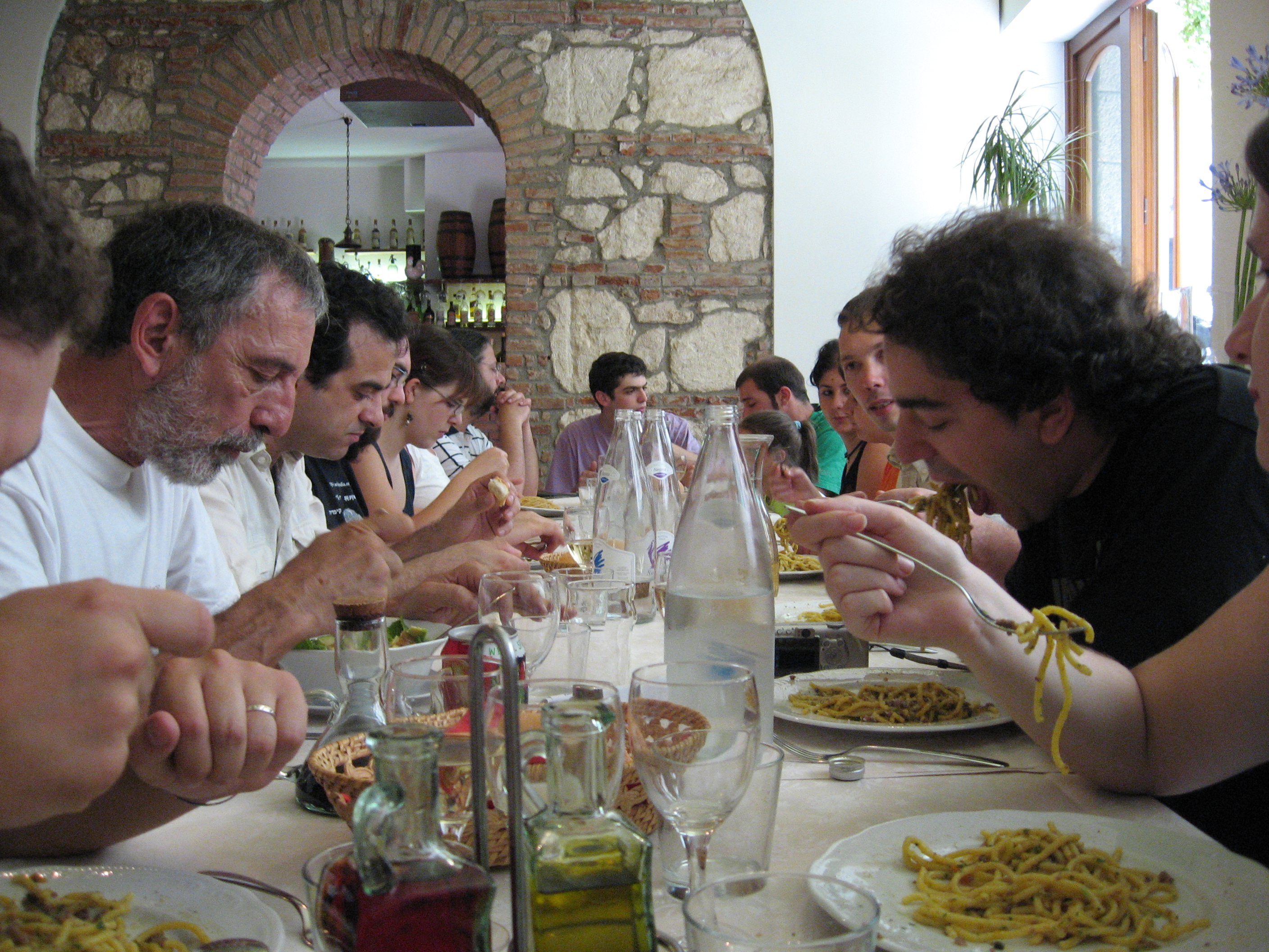 Wikipediani a tavola.